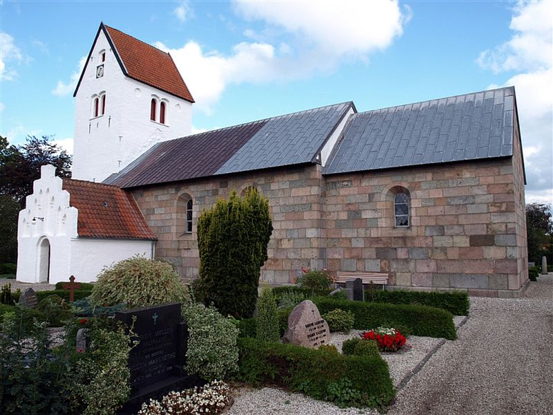 Rødding Kirke, (Viborg Kommune), set fra syd